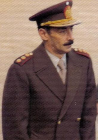 Argentine dictator Jorge Rafael Videla at the opening of 1976's "Exposición Rural" in Palermo, Buenos Aires El dictador argentino Jorge Rafael Videla en la inauguración de la Exposición Rural en Palermo, Buenos Aires, en 1976.